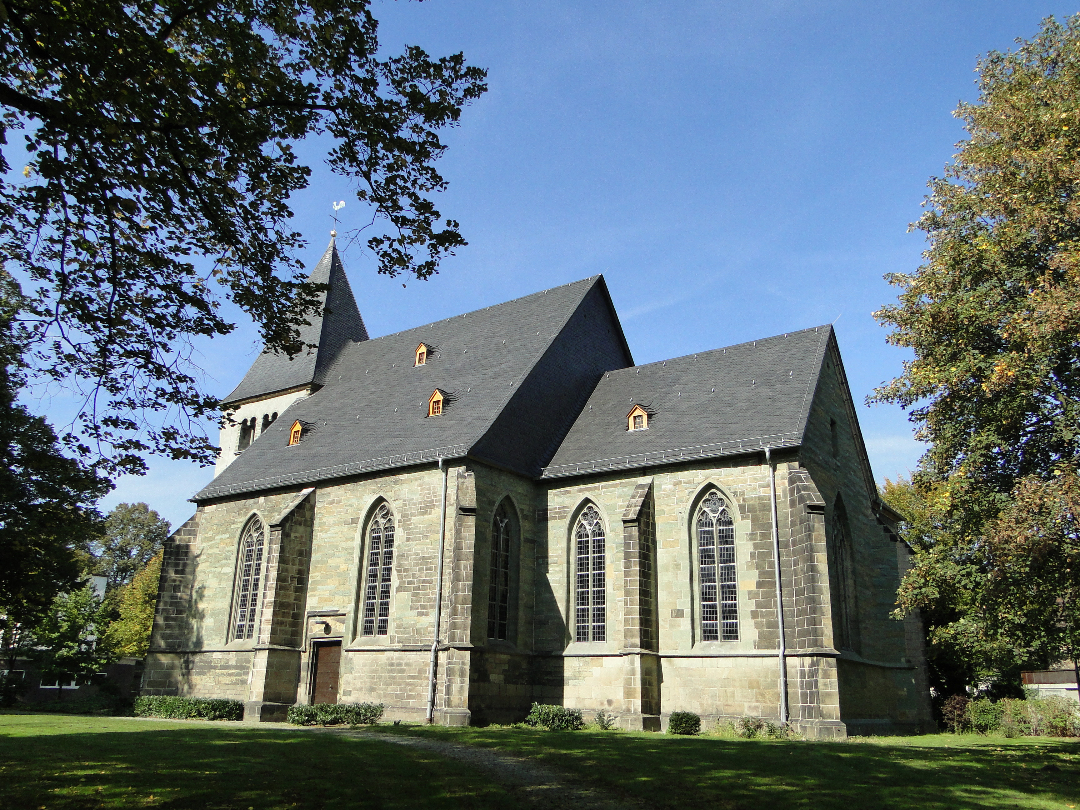 Hamm, Germany